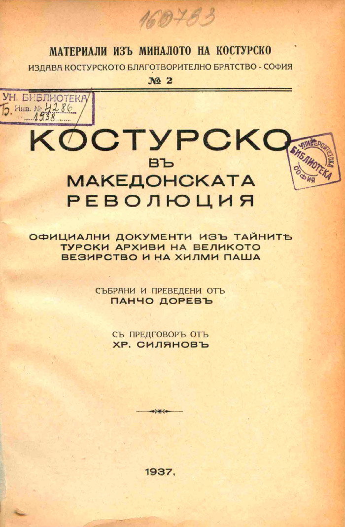 Корица на "Костурско в македонската революция" от Панчо Дорев.